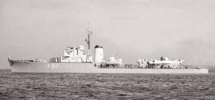 Die deutsche Schulfregatte Raule (F217)